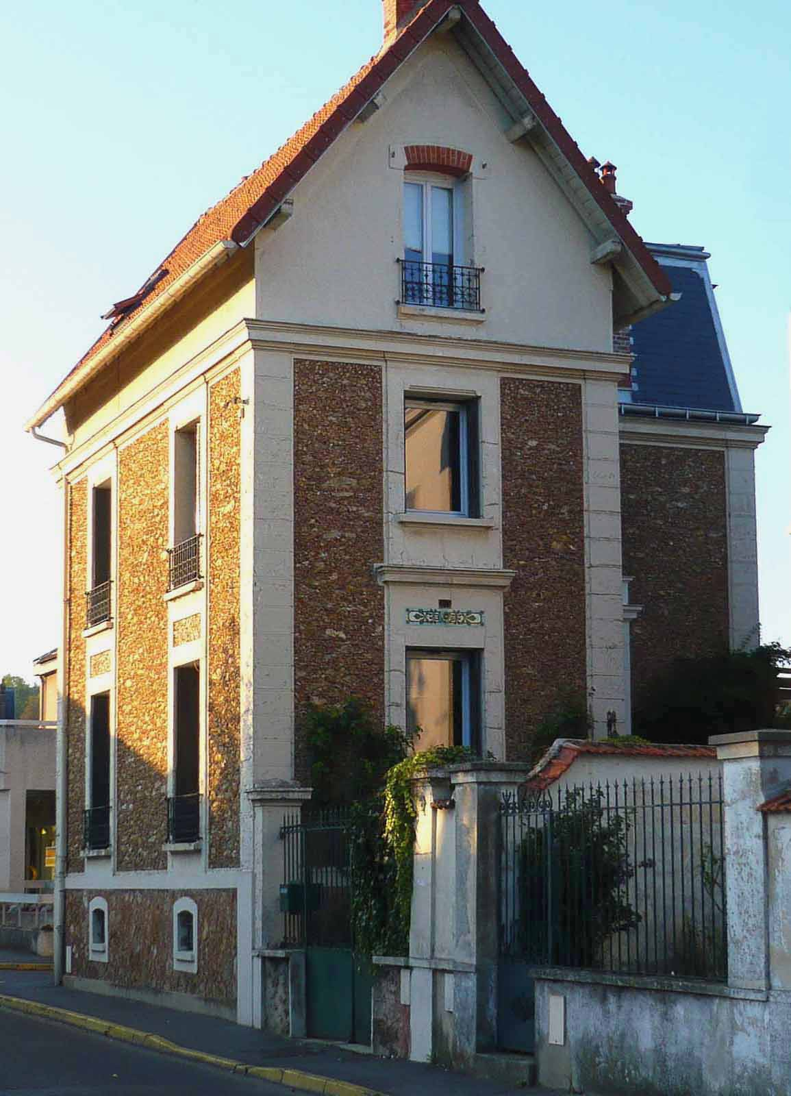 Maison meulière, La Ferté-sous-Jouarre, Seine-et-Marne, région Île-de-France, France